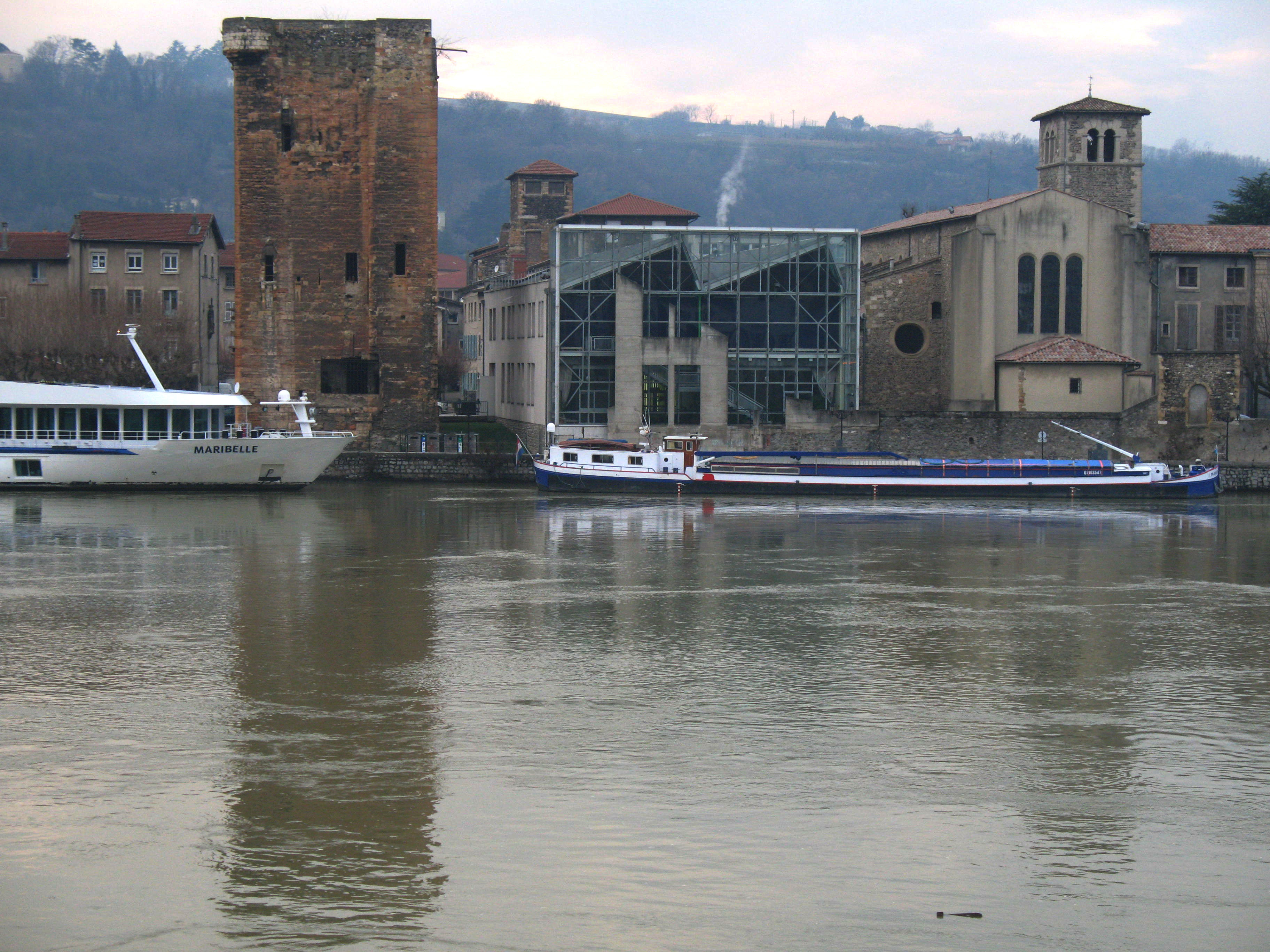 Tour des Valois et église des Cordeliers se reflétant dans le fleuve à Sainte-Colombe dans le Rhône.